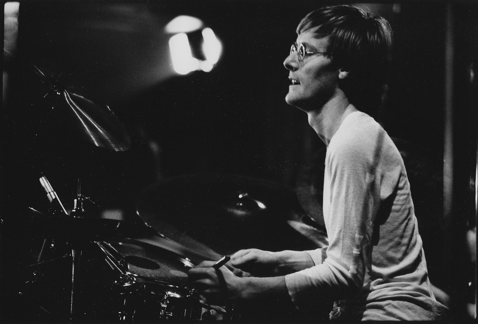 Pavol Kozma, slovenský bubeník, Esprit Band, Vokalíza 1984, Lucerna, 25. září 1984